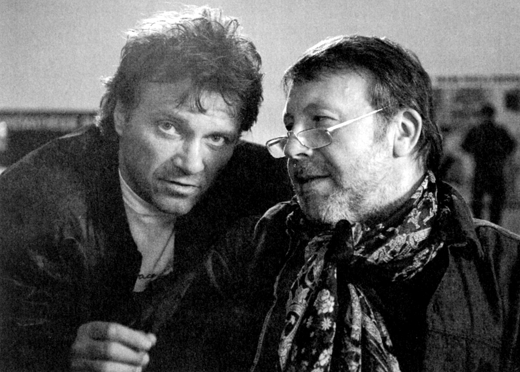 Der Tod zu Basel, Film von Urs Odermatt. Wolfram Berger (links), Günter Lamprecht (rechts).